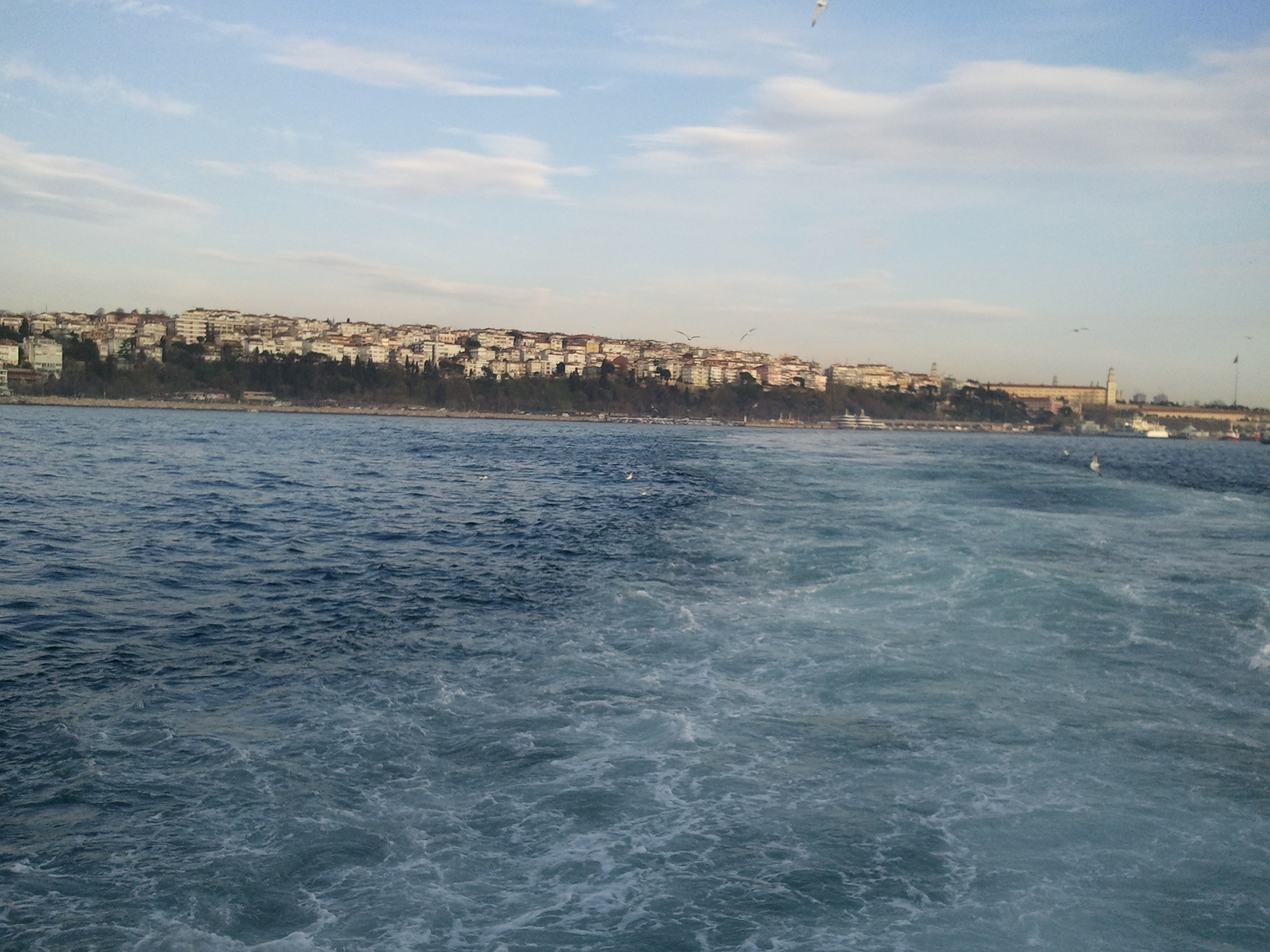 Harem